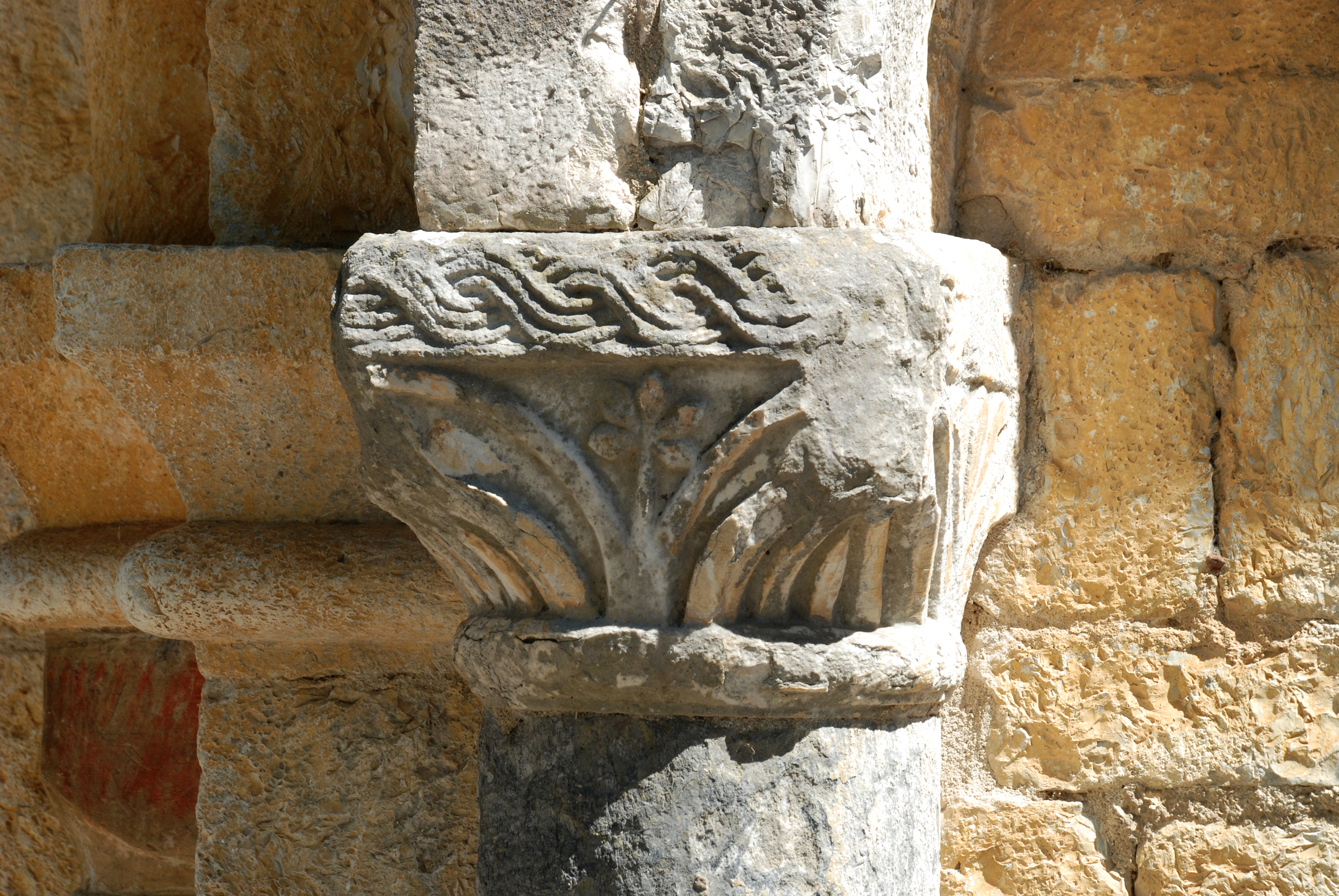 France - Hérault - Église Saint-Nazaire et Saint-Celse de Brissac